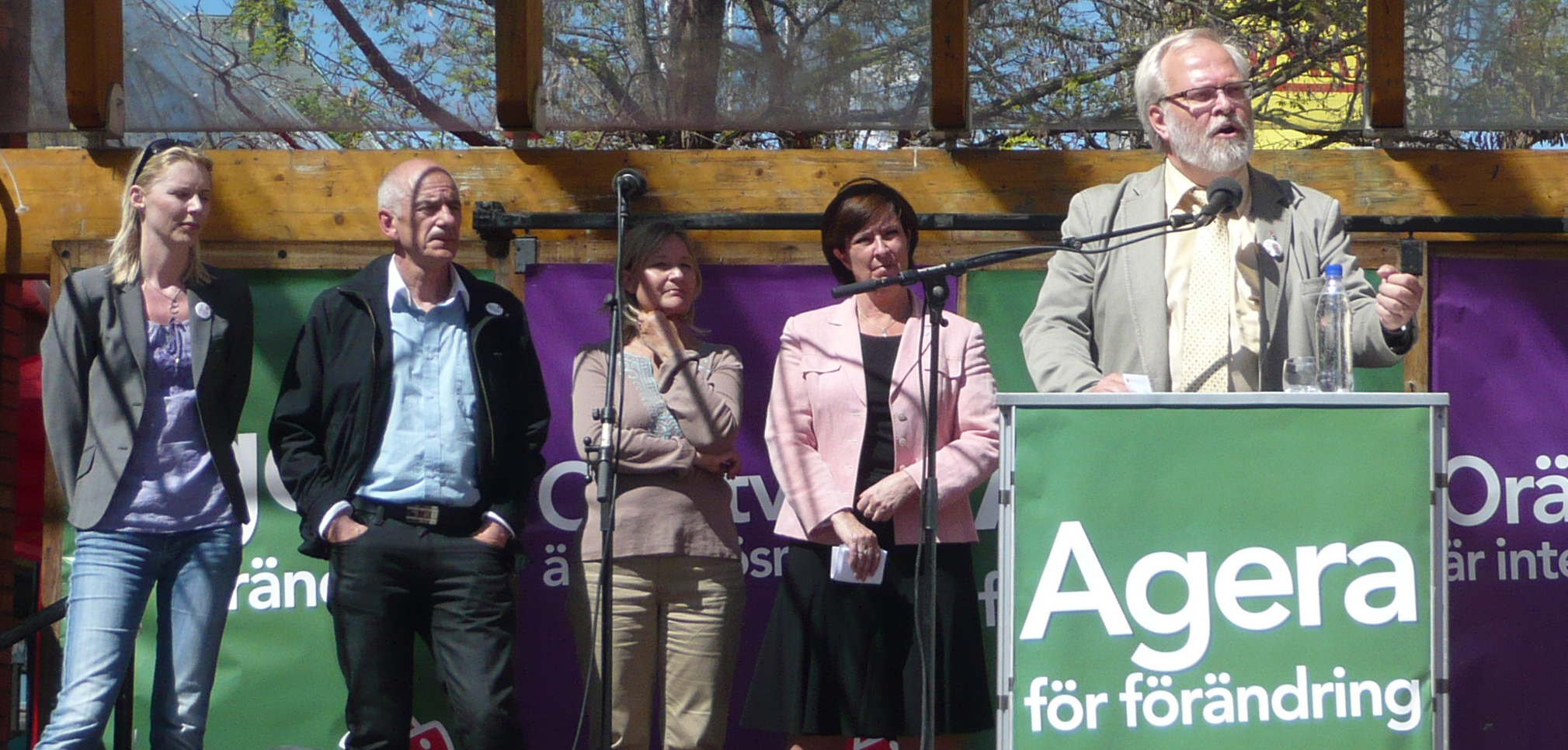 Fr.v. Åsa Westlund, Olle Ludvigsson, Marita Ulvskog, Mona Sahlin och Göran Färm i Västerås inför EU-valet.